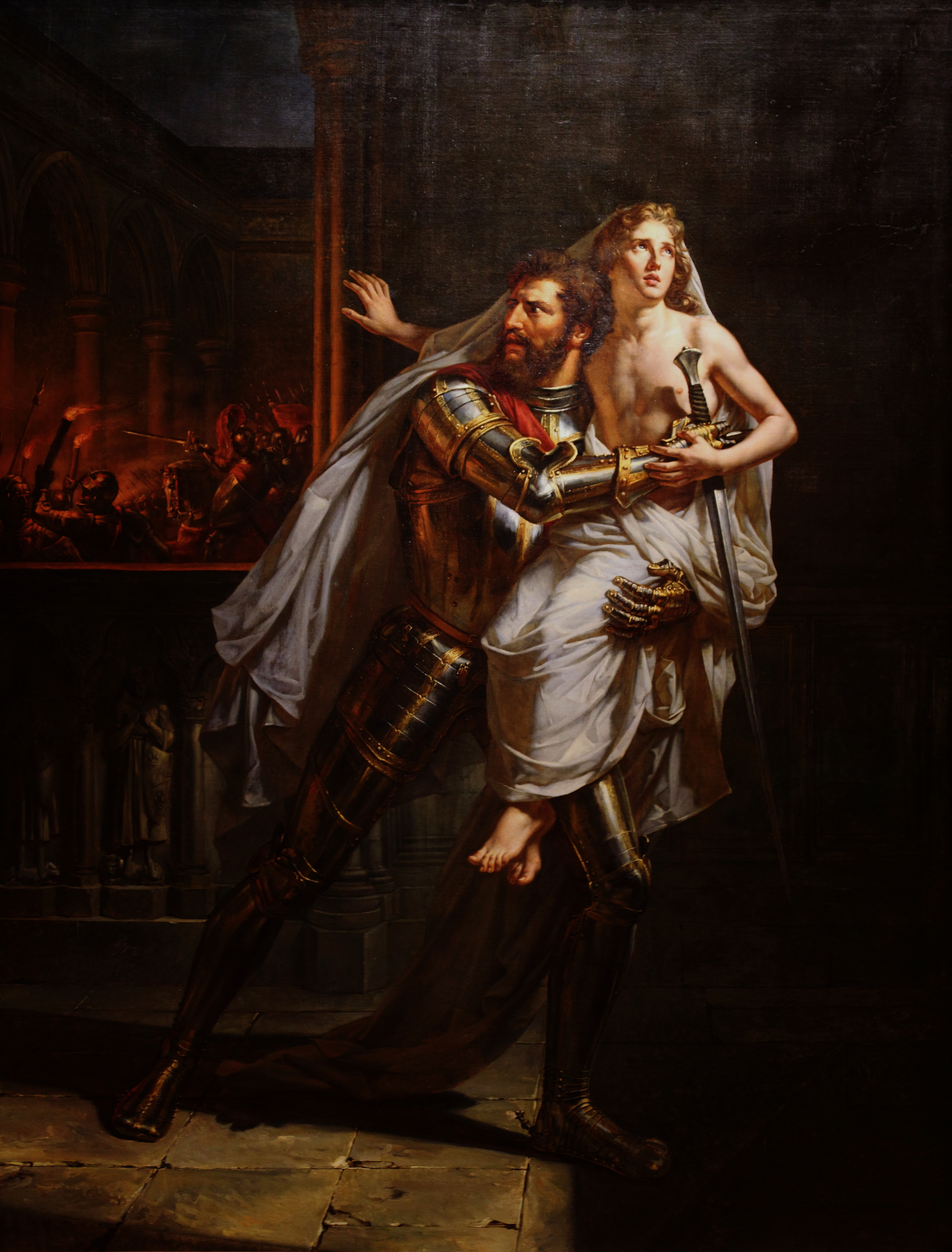 Tanneguy du Châtel sauvant le Dauphin (Musée des beaux-arts de Rennes) Envoi de l'Etat, 1828. Restauré avec l'aide de BNP-Paribas, 1996. Inv D.1828.1.1